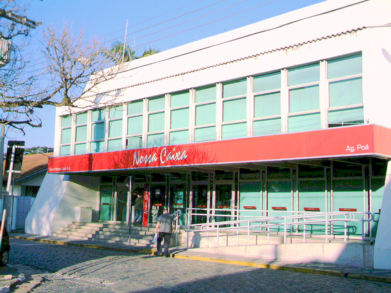 Nossa Caixa, agência Poá